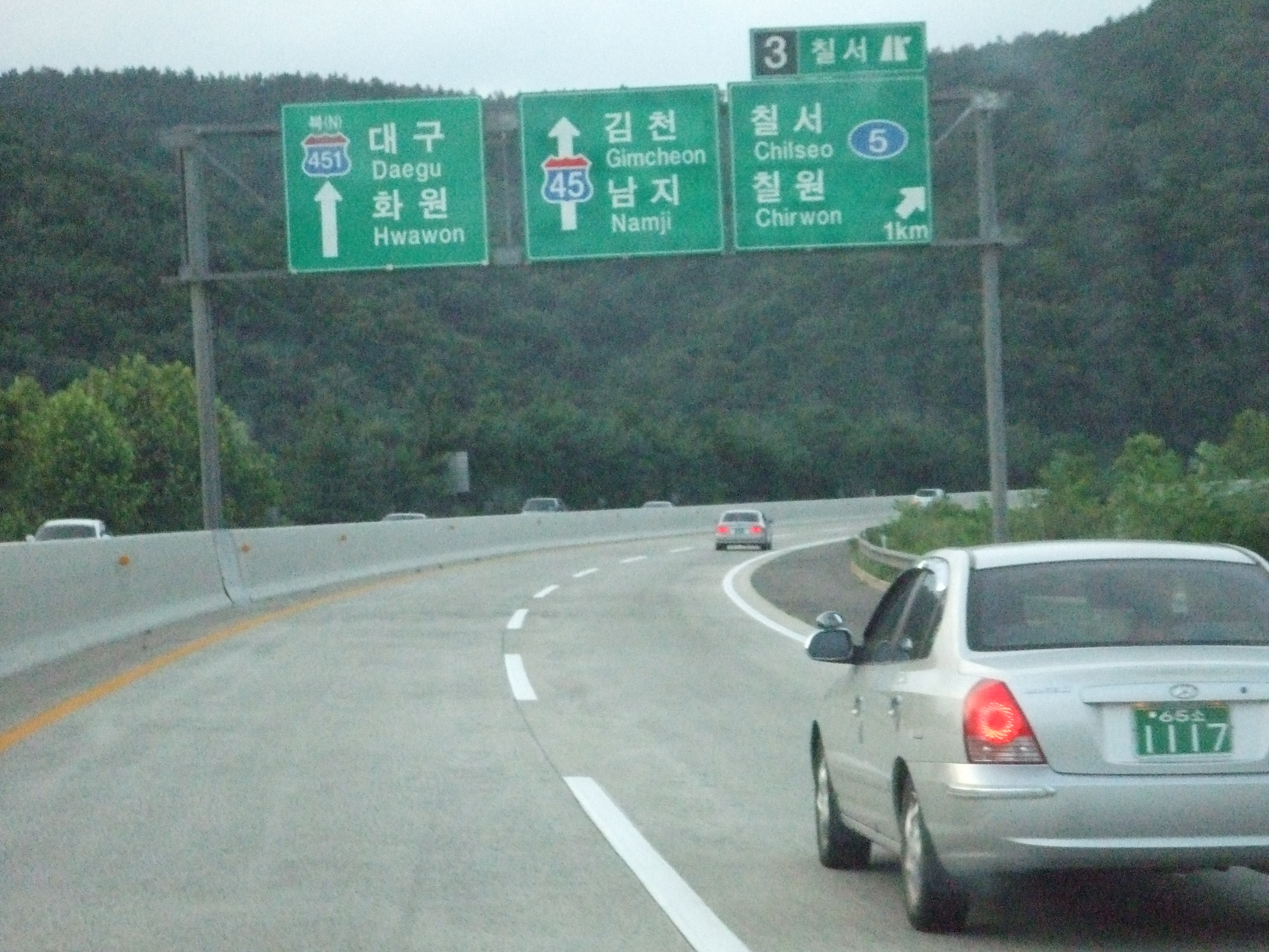 구마고속도로 대구방향.